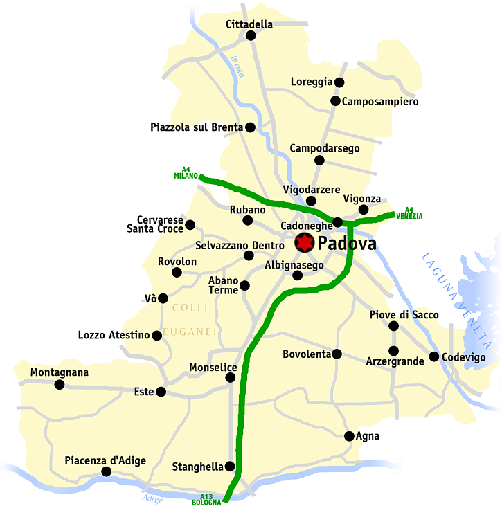 Kaart van de provincie Padua